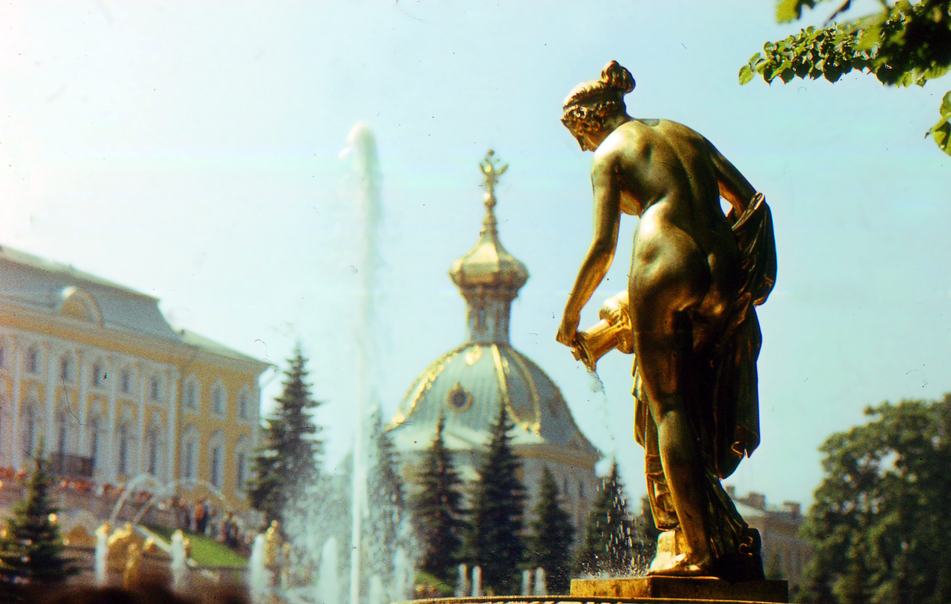 Петергоф.Одна из Данаид.